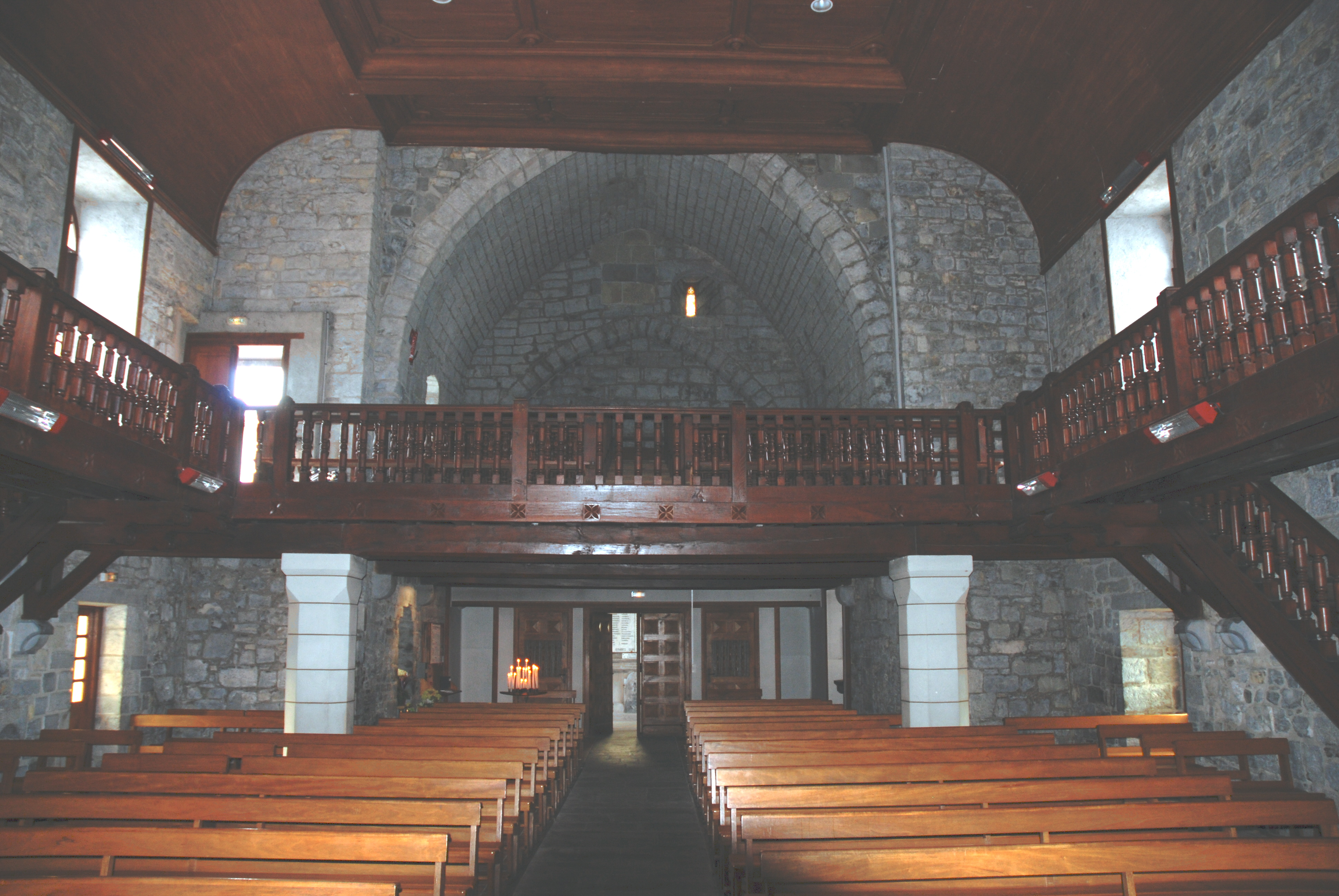 Irissarry, intérieur de l'église Saint-Jean-Baptiste avec sa galerie